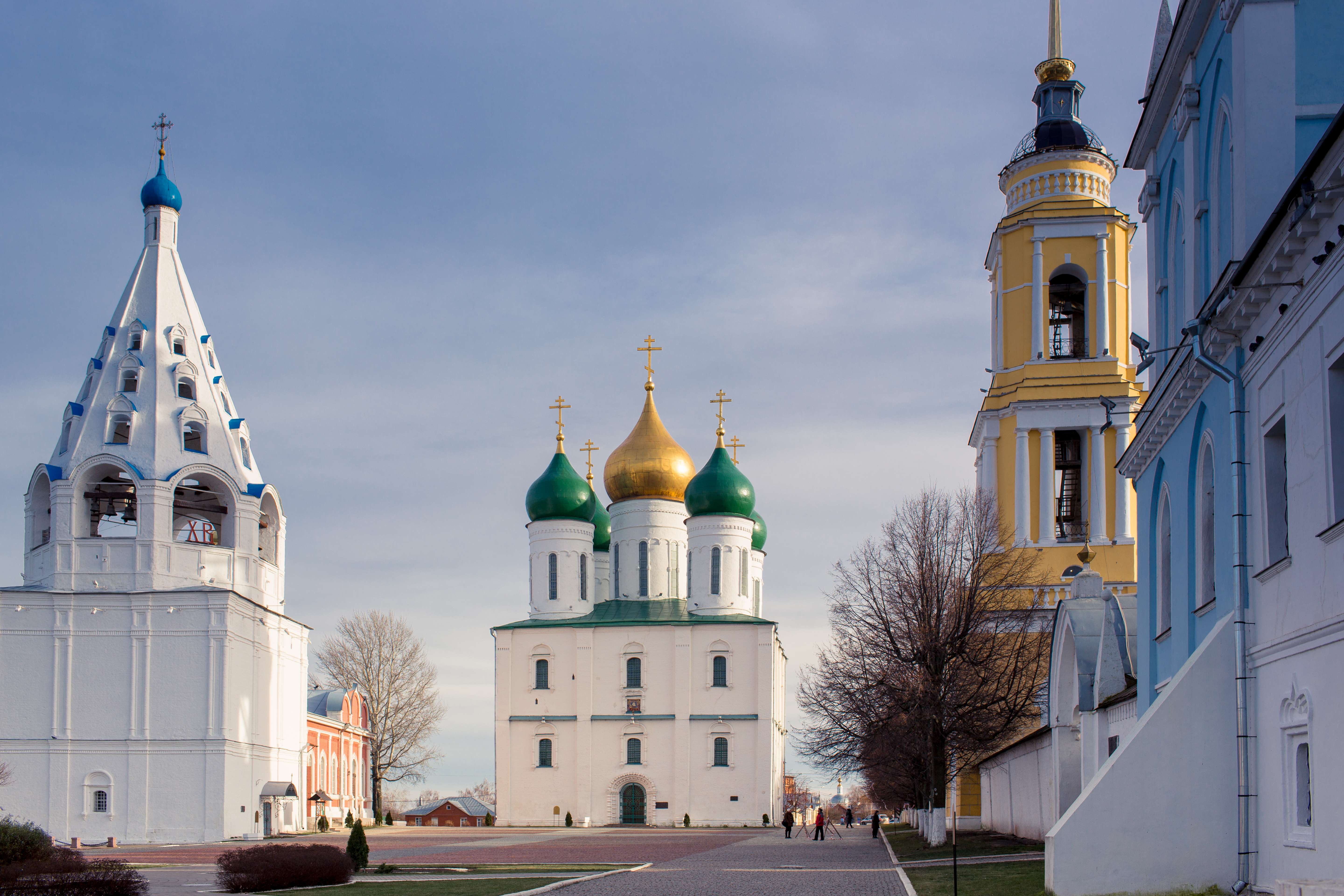 Собор Успения Пресвятой Богородицы (Москва и Московская область, Коломна, улица Лазарева, 14 / Казакова, 5)